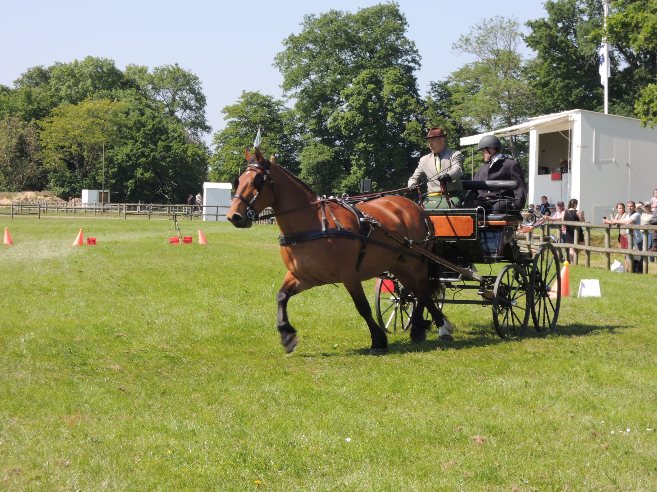 Salon du cheval au travail 2014 à Rennes. Concours national élite attelage. Épreuve de maniabilité.